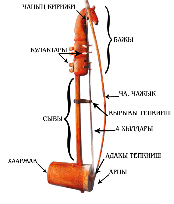 Тыва дыл: бызаанчының тургузуу база кезектериниң аттары